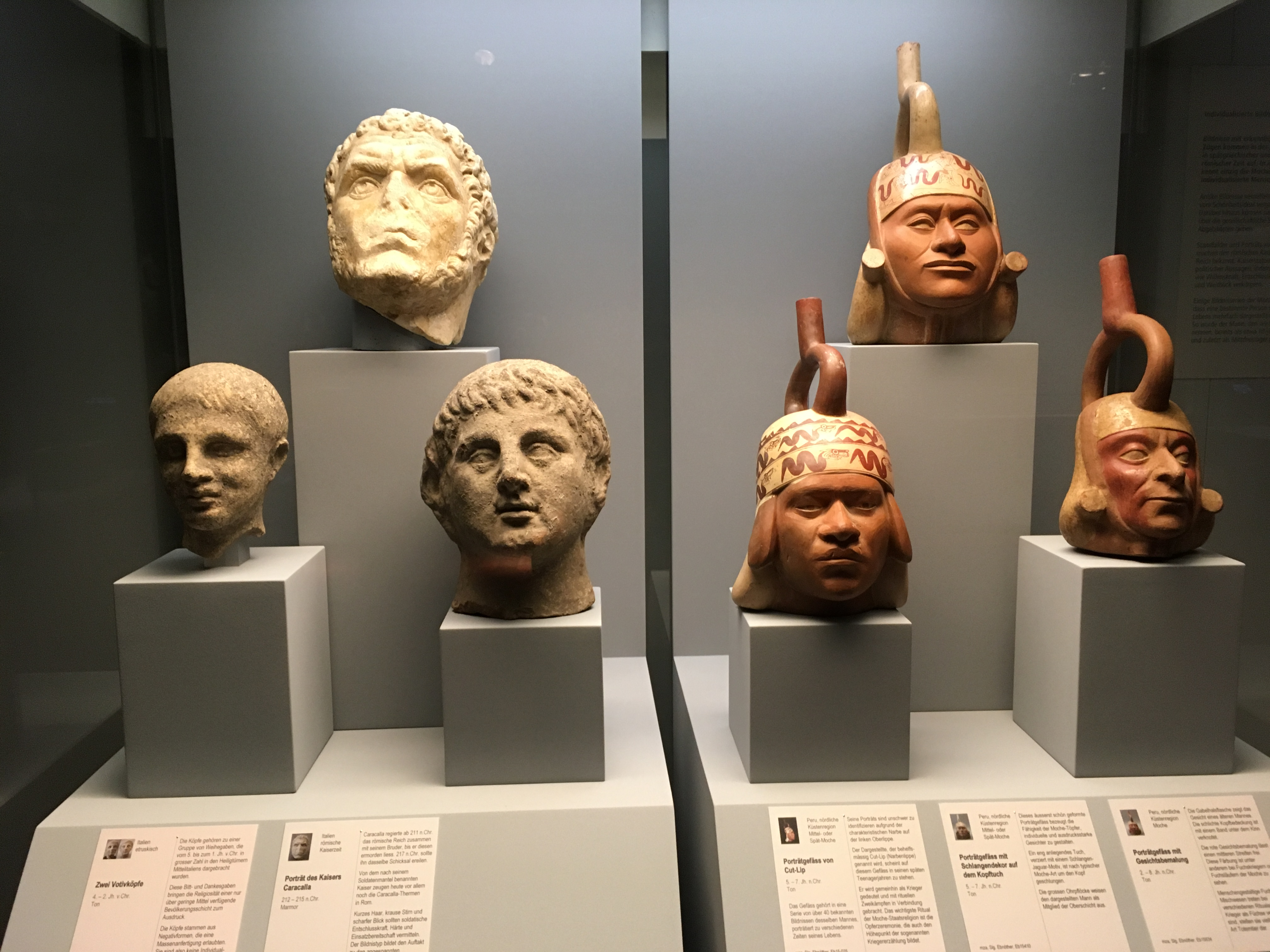 Ausstellungsstücke der Ausstellung